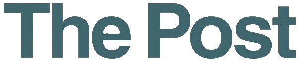 ペンタゴン・ペーパーズ/最高機密文書 ロゴ